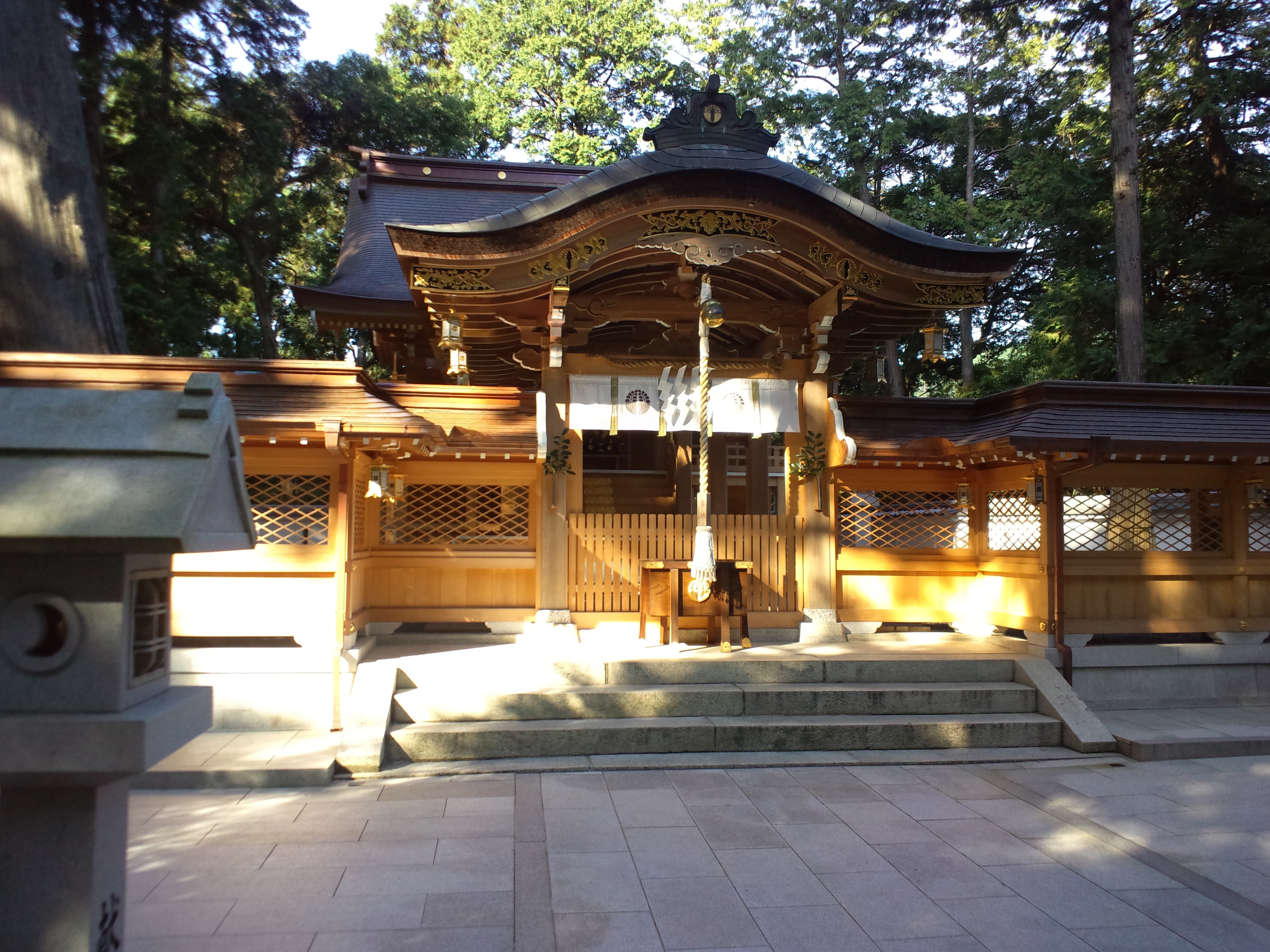 田村神社 本殿